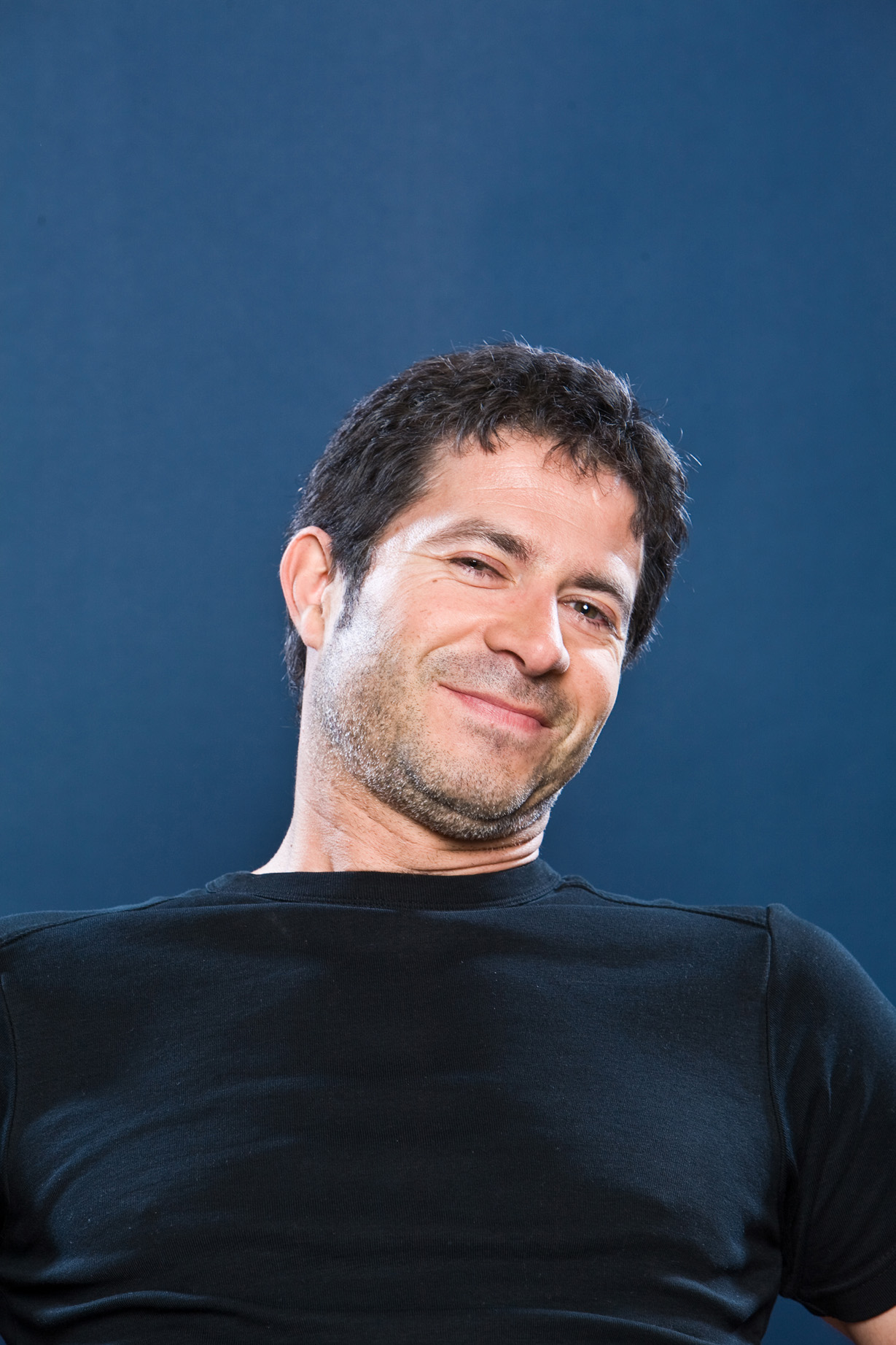 Rolf Miller Tatsachen Pressefoto